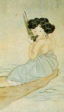 一名妓生演奏著朝鮮傳統樂器笙簧。